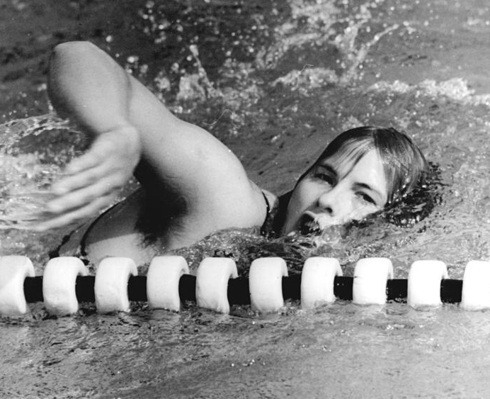 Gudrun Wegner ADN-ZB Reiche 14-7-73 Berlin: 24. DDR-Meisterschaften im Sportschwimmen-Über 800 m Freistil (Foto) erkämpfte Titelverteidigerin Gudrun Wegner (SC Einheit Dresden) in 9:11,93 min ihre dritte Goldmedaille der diesjährigen Meisterschaften. Sie war über 400 m Lagen (5:05,37 min-DDR-Rekord) und in der 4 x 100-m-Lagenstaffel (mit Herbst,Linke,Wegner,Eichner-4:33,12-DDR-Rekord für Klubstaffeln) bereits erfolgreich.